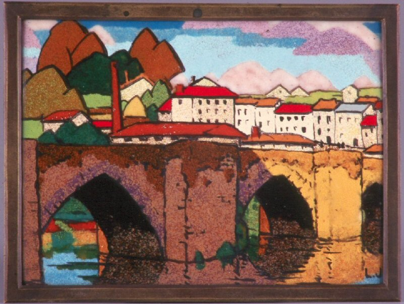 Reproduction email